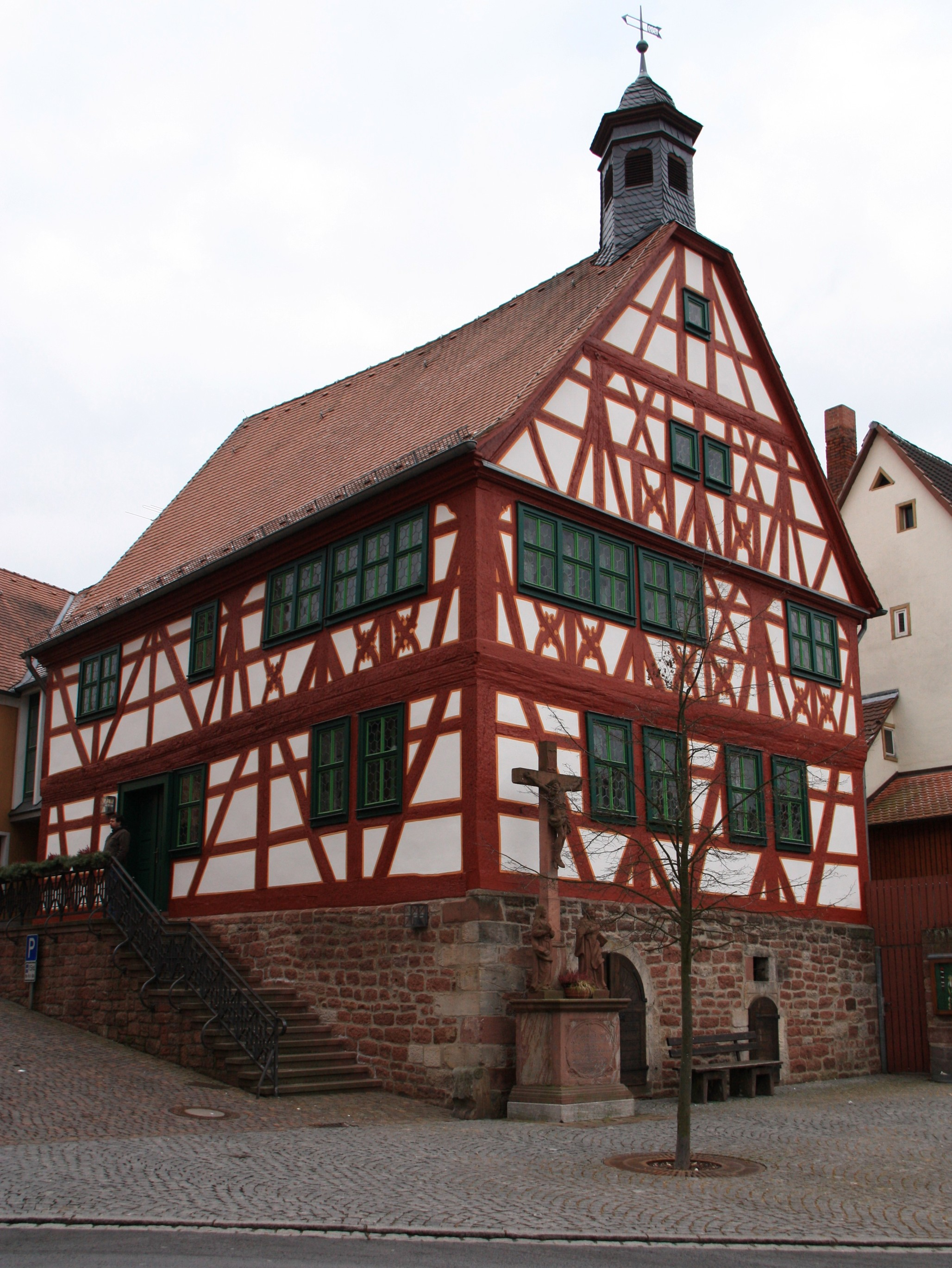 Das Alte Rathaus von Mönchberg